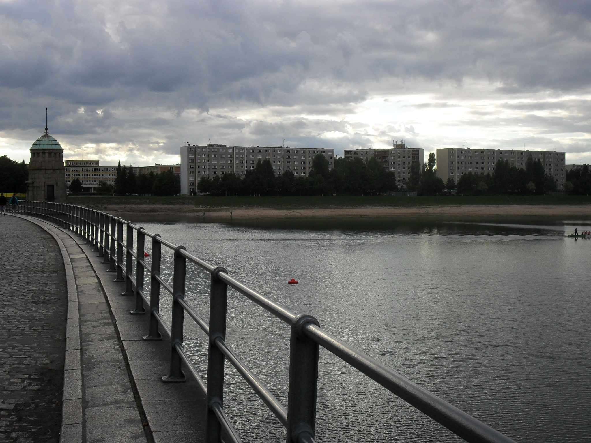 Pohled na Mšenskou nádrž a zástavbu